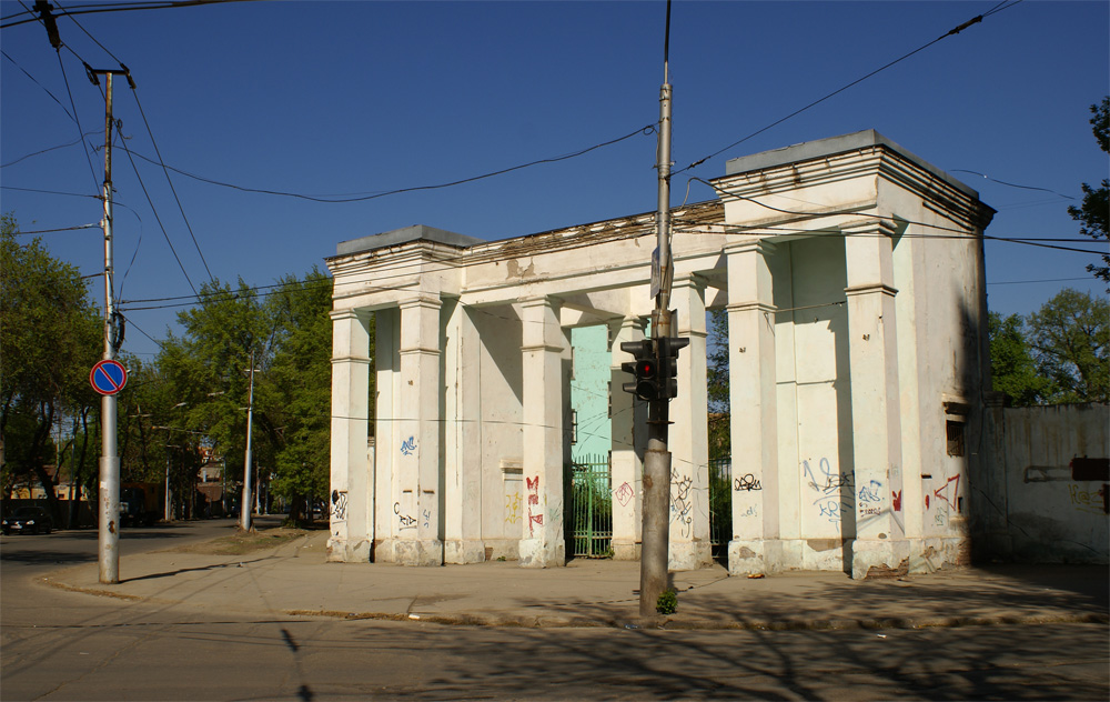 Вход на стадион «Буревестник» в Самаре. Был разрушен в 2010 году.